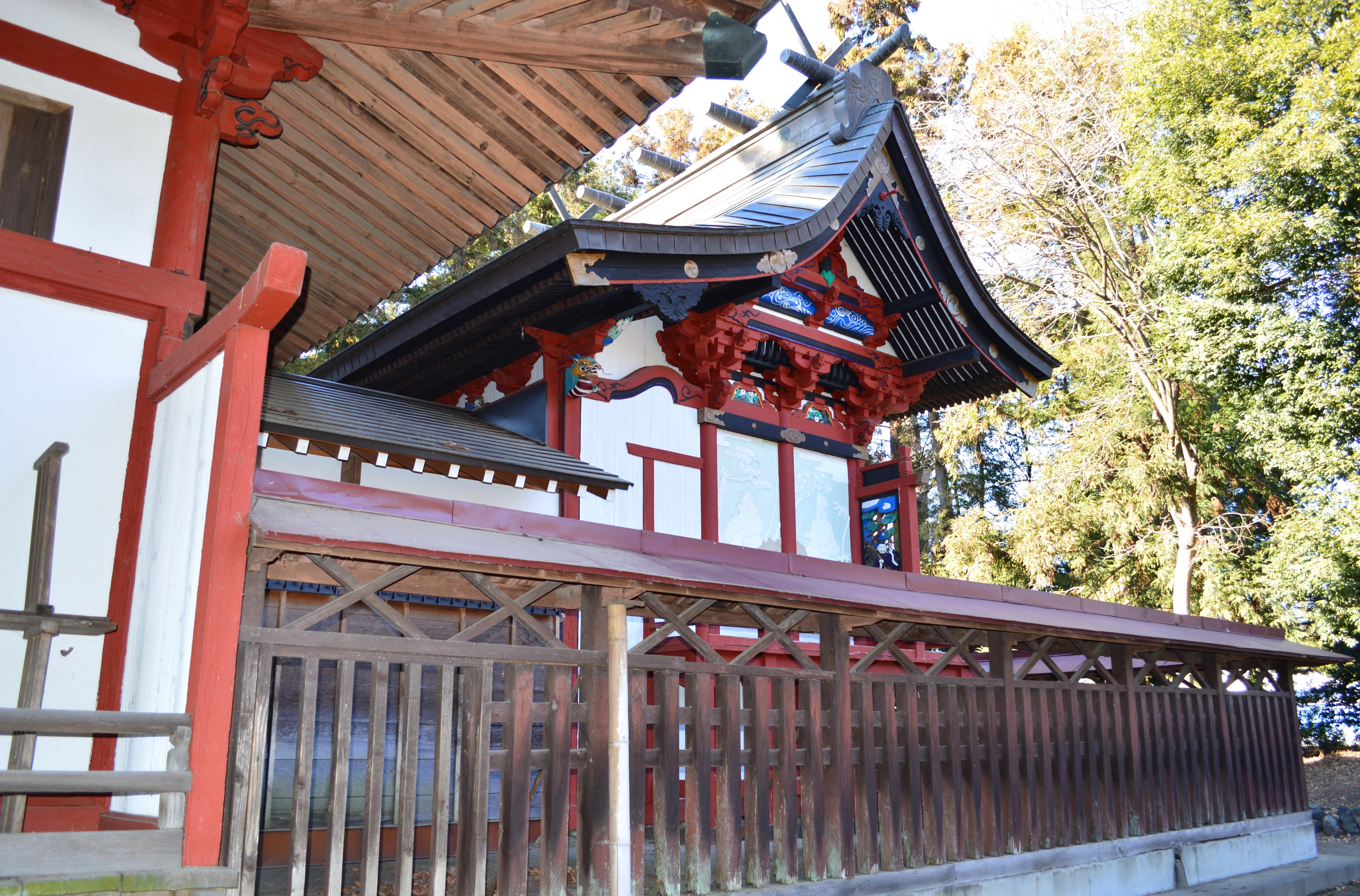 火雷神社 (玉村町) 本殿